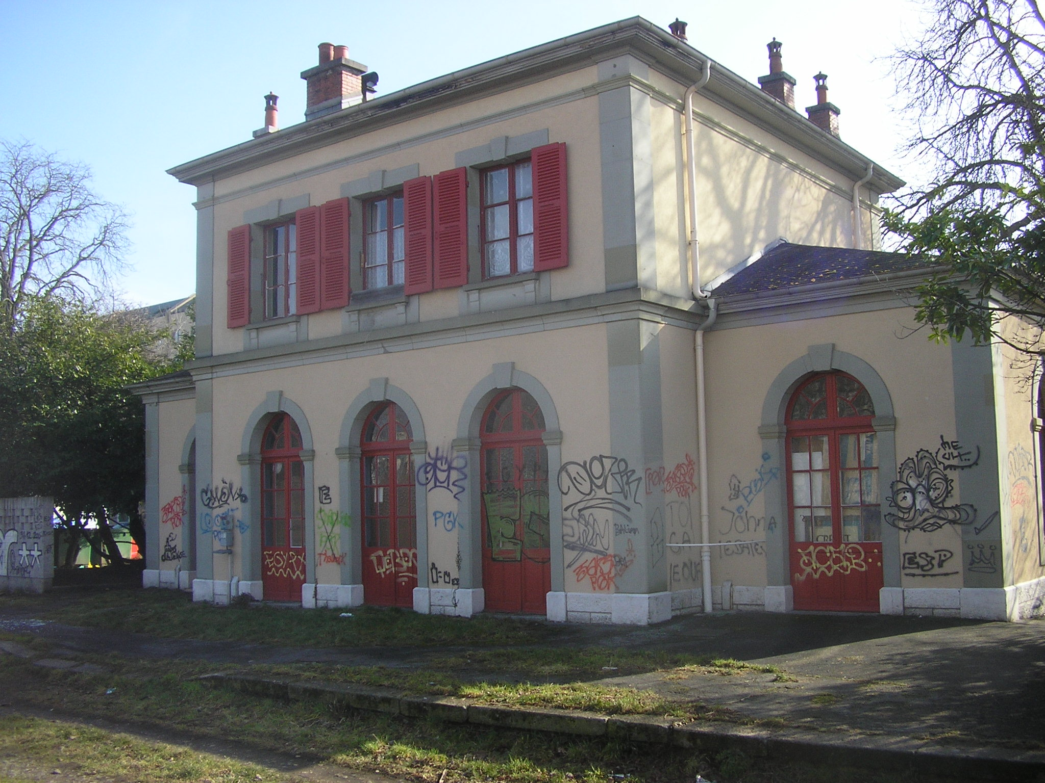 Gare de Chêne-Bourg, désaffectée. Vue du côté des voies.